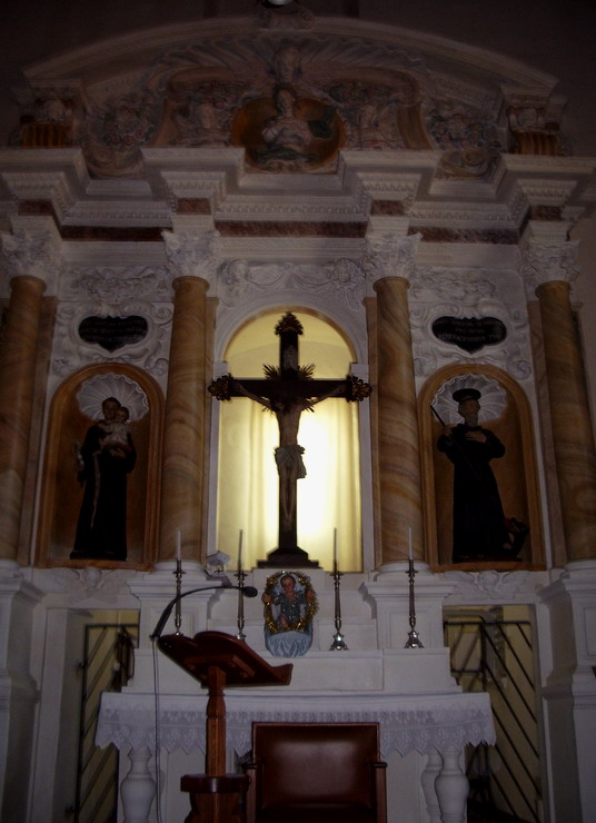 L'altare maggiore della Pieve di Santa Maria Assunta (o Santa Maria in Arcione) a Buriano (GR)